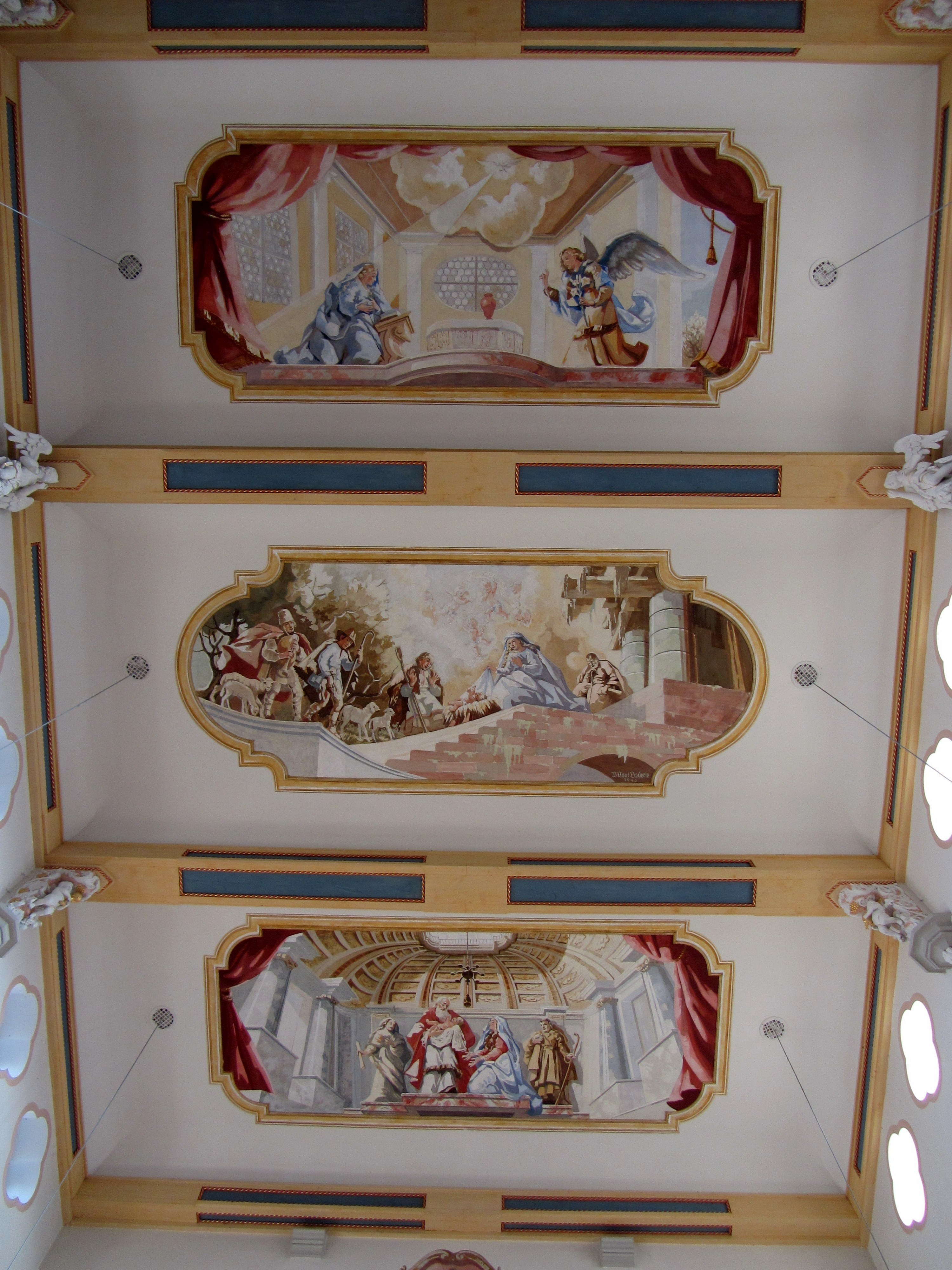 St. Gallus (Unterschwarzach)